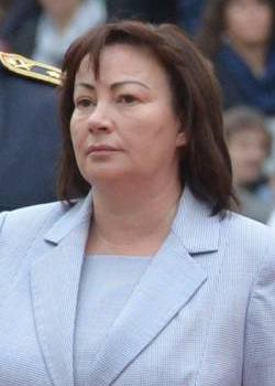 איוונה זמנובה בעת ביקור של שיא מדינת ישראל ראובן ריבלין בארמון הנשיאות של צ'כיה